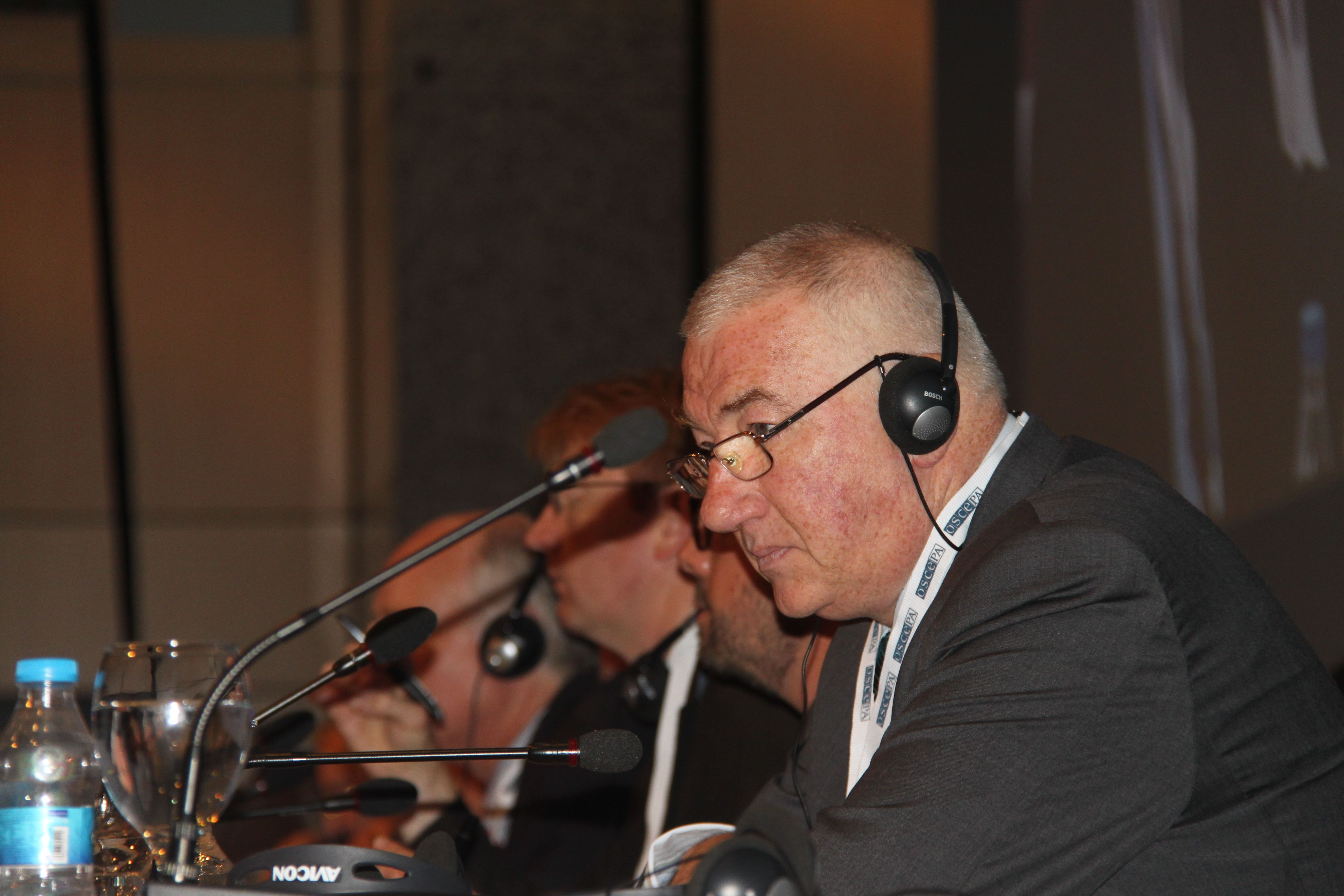 Roberto Battelli (Slovenia)